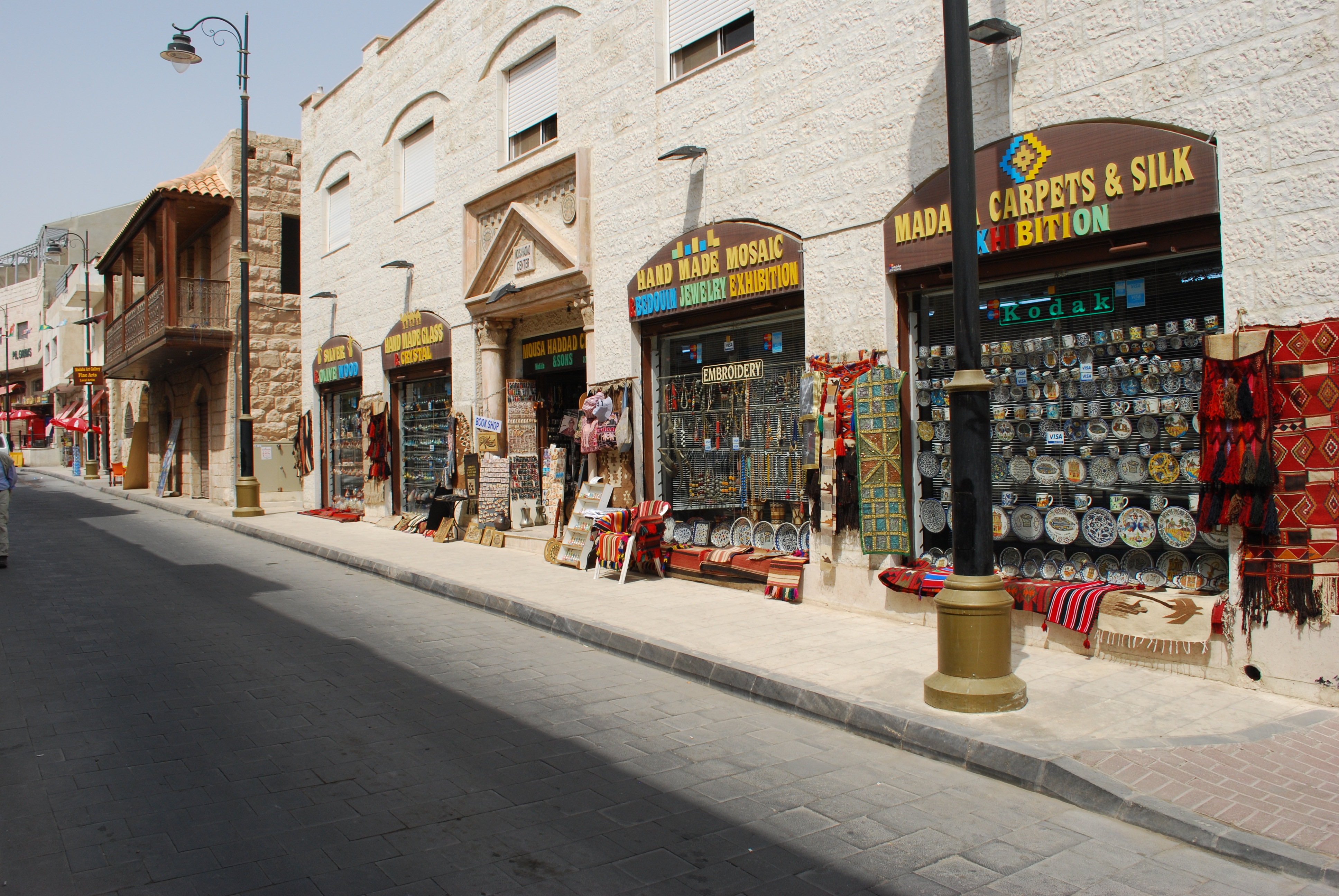 La rue Hussein Ben Ali, à Madaba.